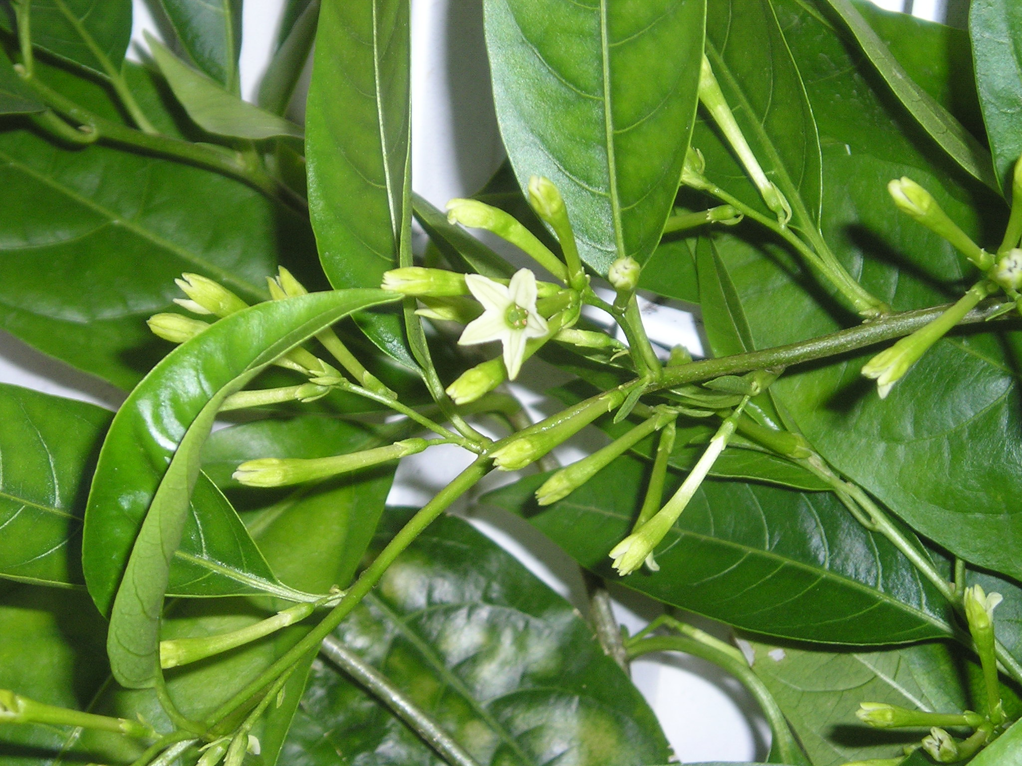 Jasmin de nuit (Cestrum nocturnum) : photographie prise le matin, avec fleurs refermées sauf une encore ouverte